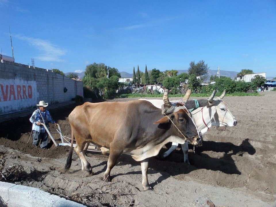 Yunta de bueyes en los campos fértiles de Palmarito Tochapán.